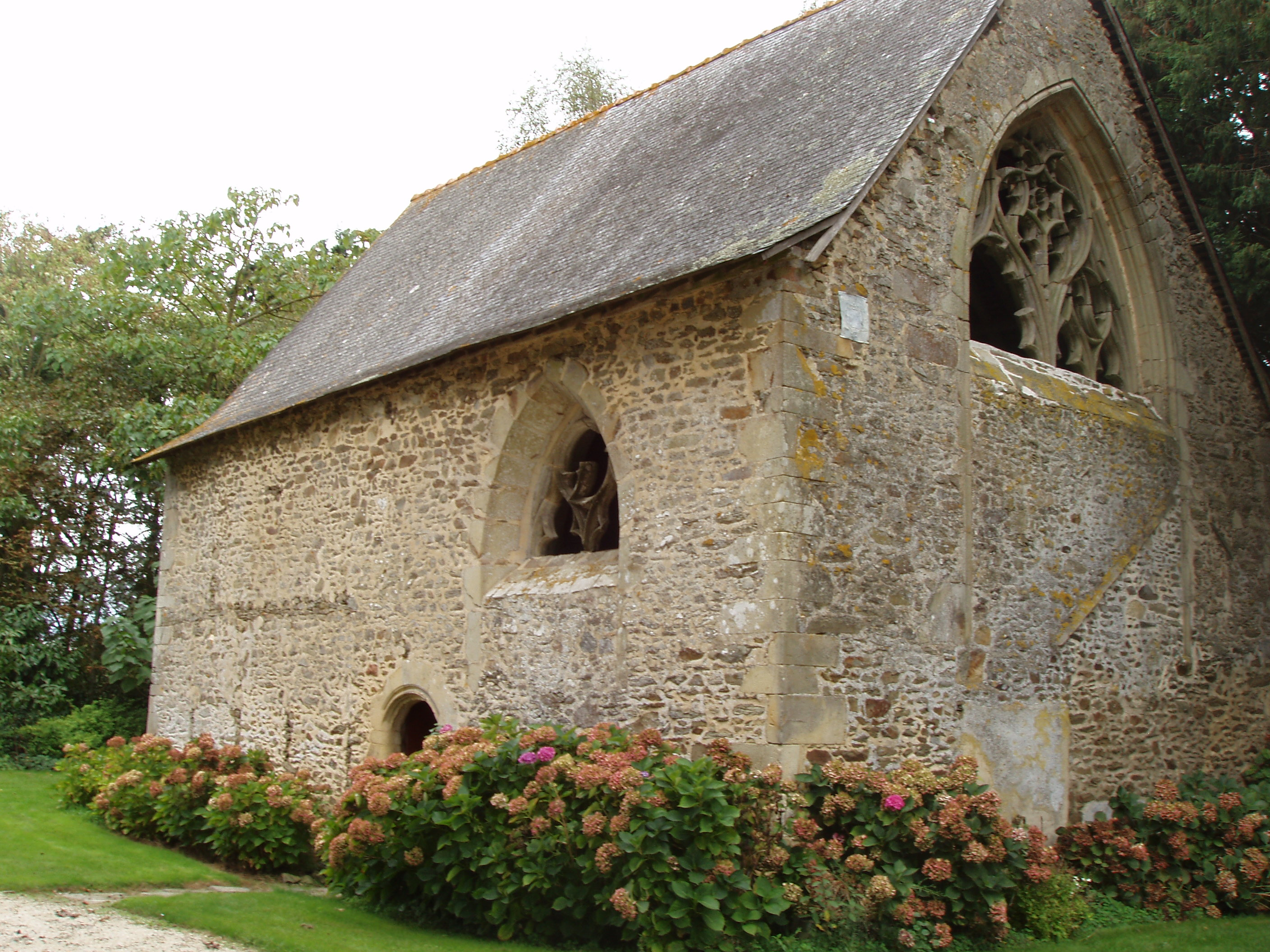 Chapelle du Pinel à Argentré-du-Plessis (Ille-et-Vilaine, France).